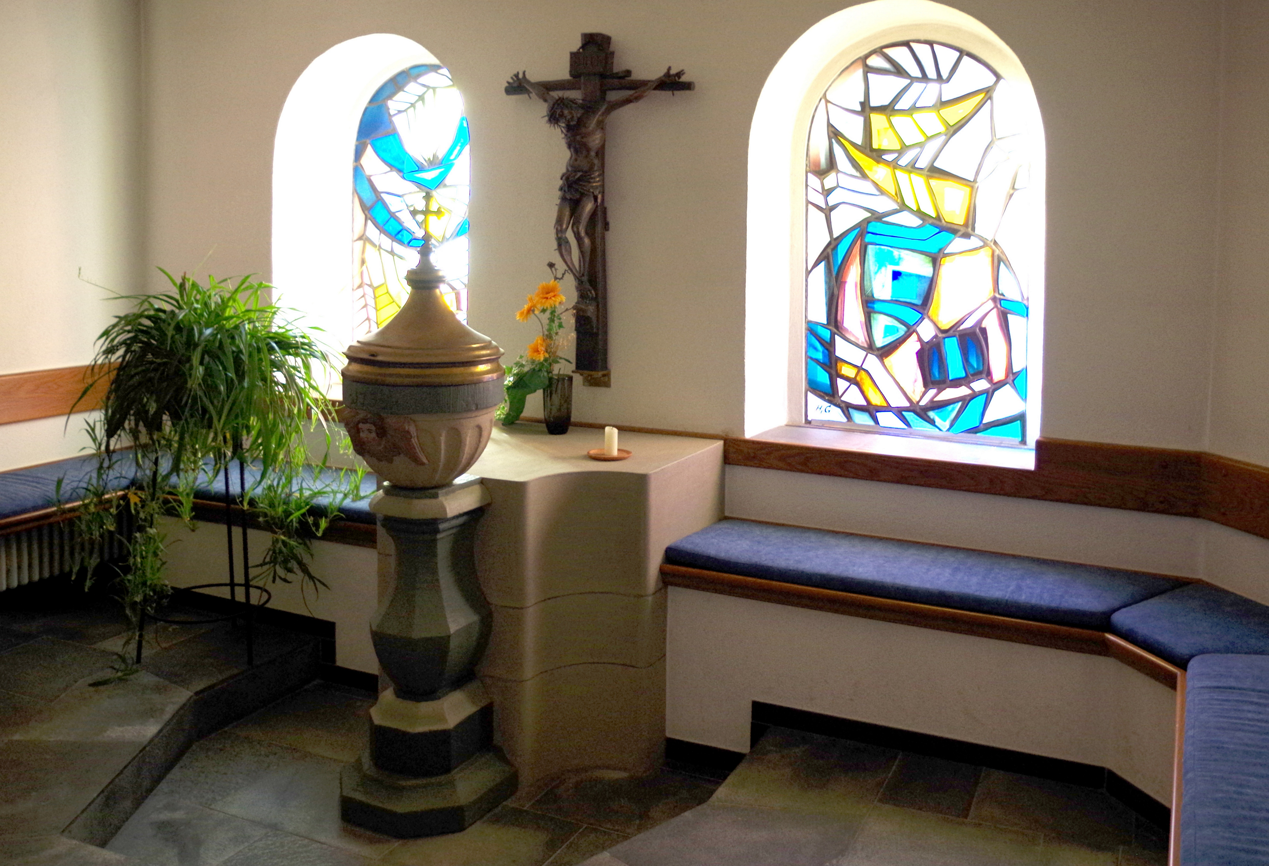 St. Martin (Schmidtheim), Taufkapelle, ehemalige Sakristei